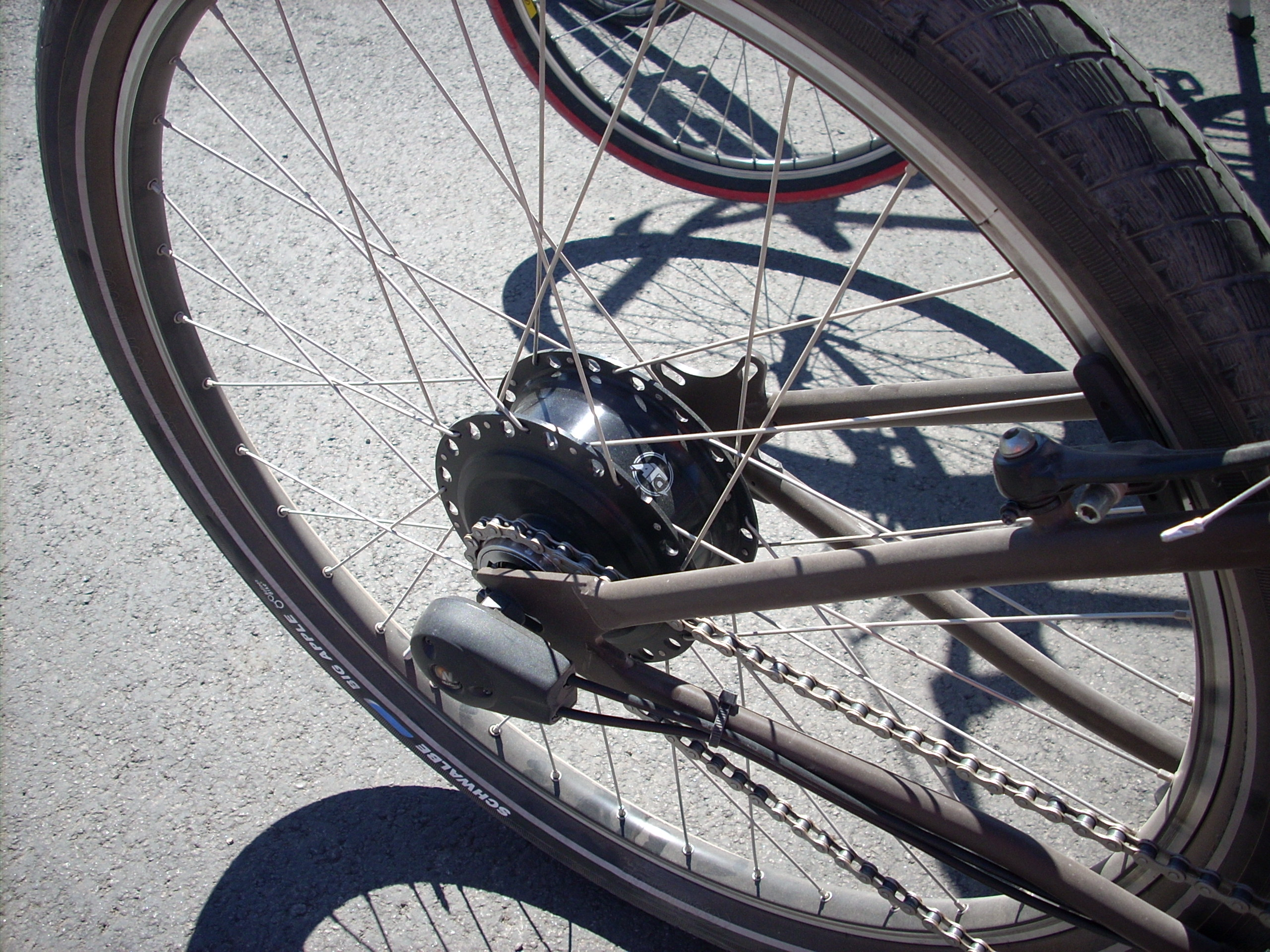 NuVinci